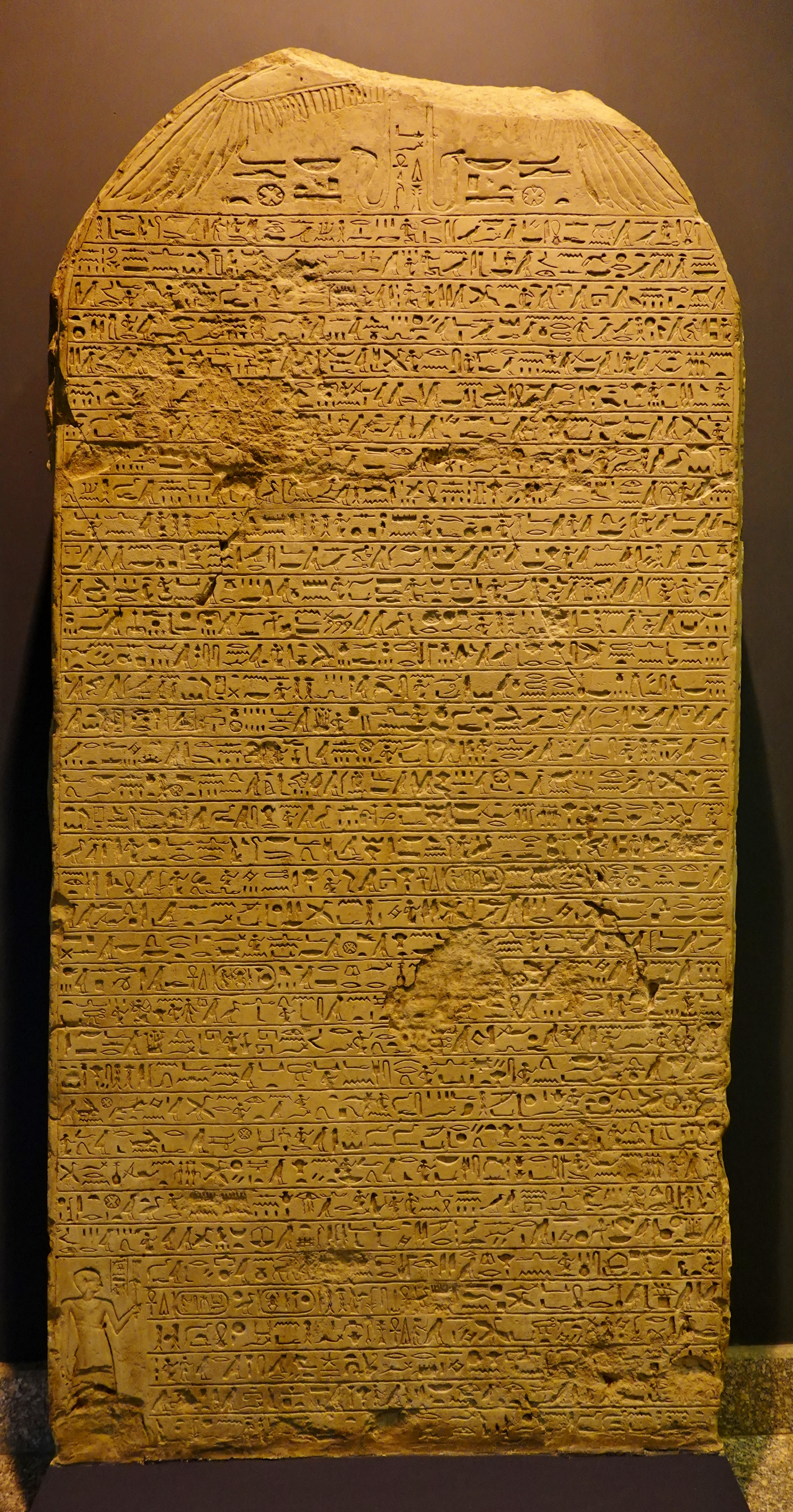 Siegesstele des Kamose aus dem Tempel von Karnak (17. Dynastie, 1571–1569 v. Chr., Kalkstein, Höhe 231 cm, Breite 109 cm), ausgestellt im Luxor-Museum, Luxor, Ägypten